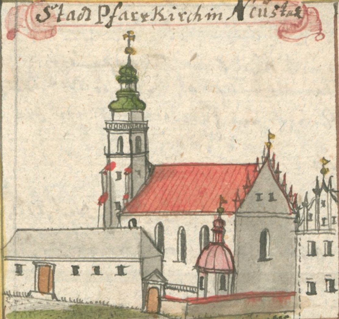 Stadt Pfarr Kirch in Neustadt